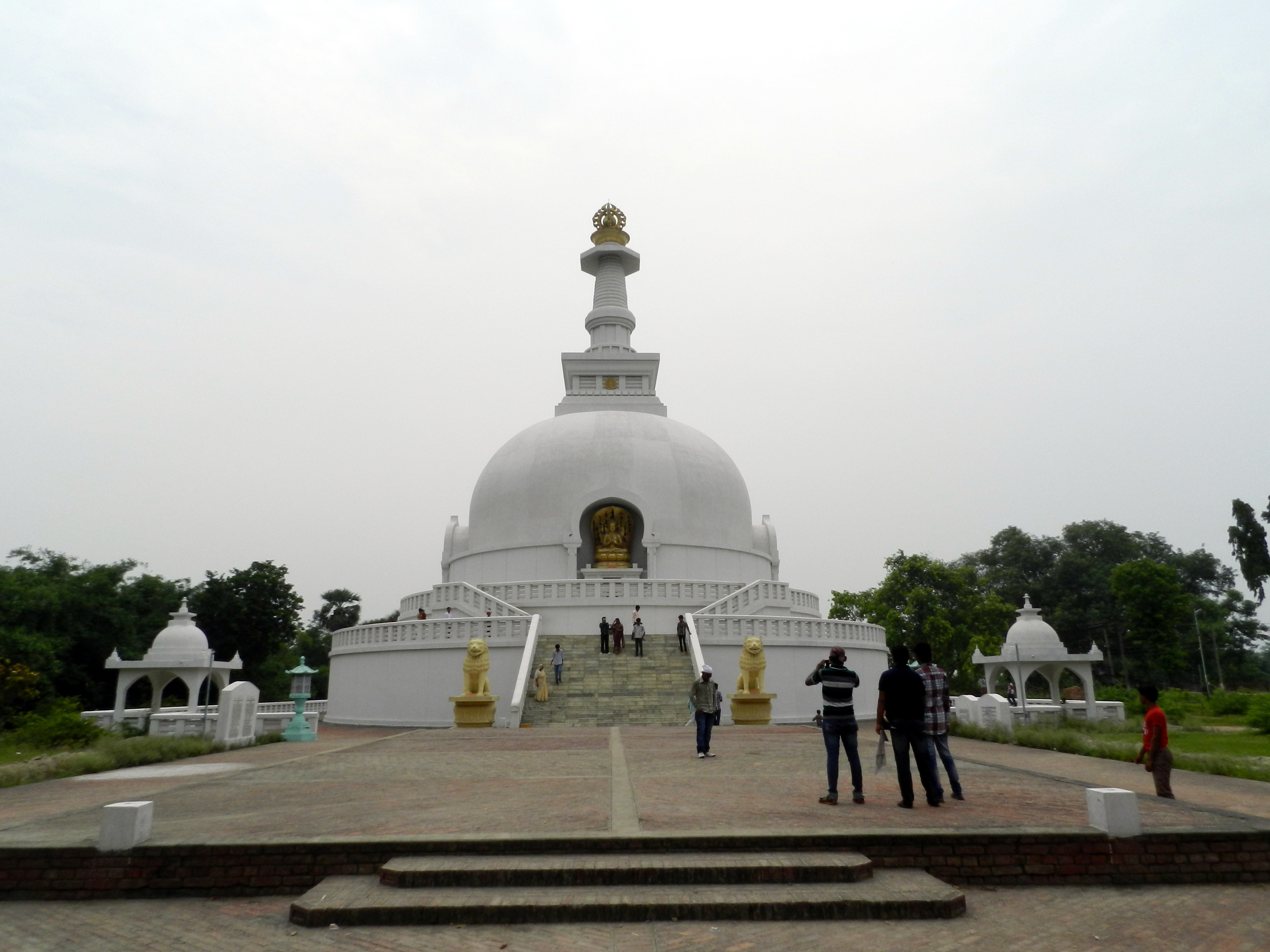 Shanti Stupa @ Vaishali